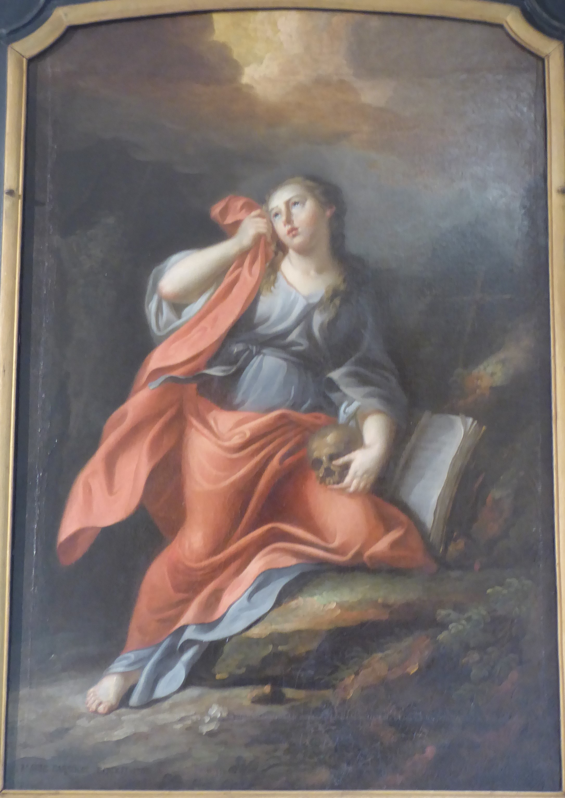 Madeleine repentante de Marie Parrocel, musée de Dreux, Eure-et-Loir (France). Provient de la chapelle de l'Hôtel-Dieu de Dreux.